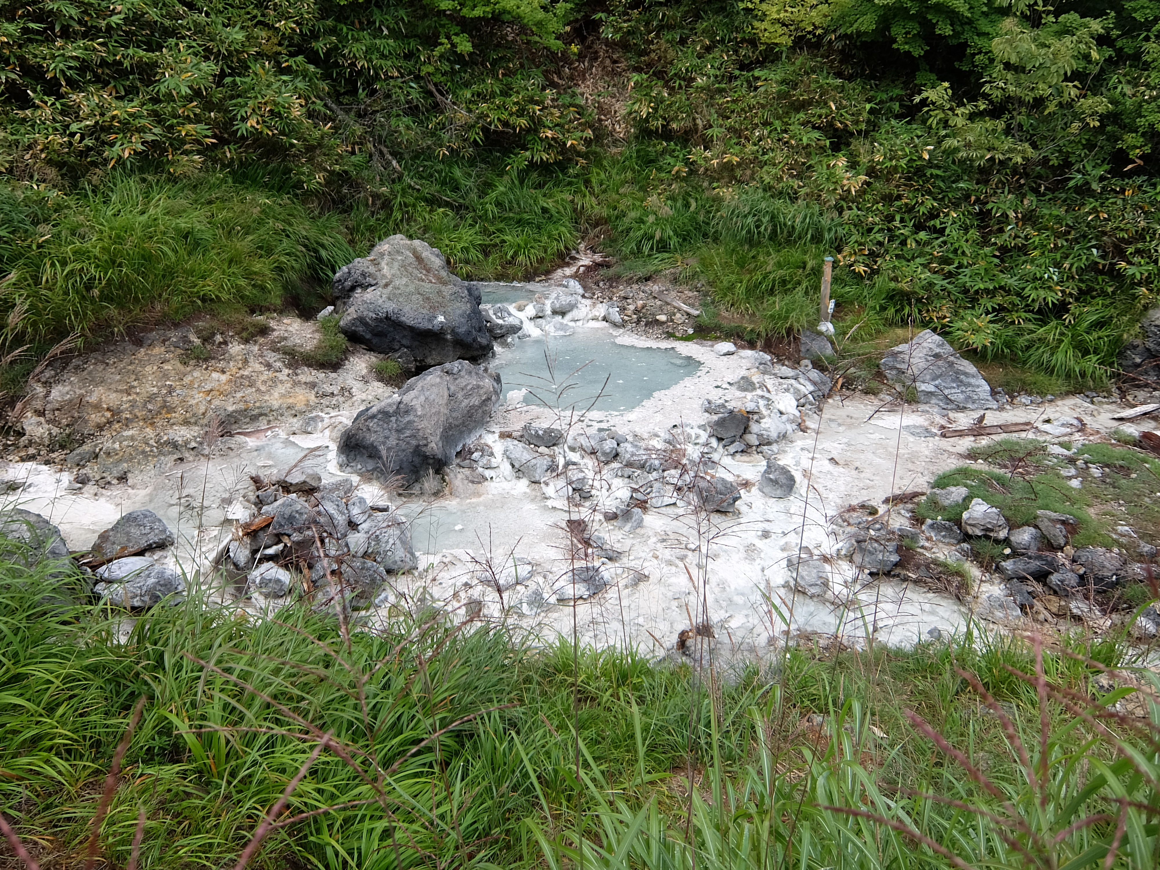 岩手県八幡平市草の湯温泉(野湯)